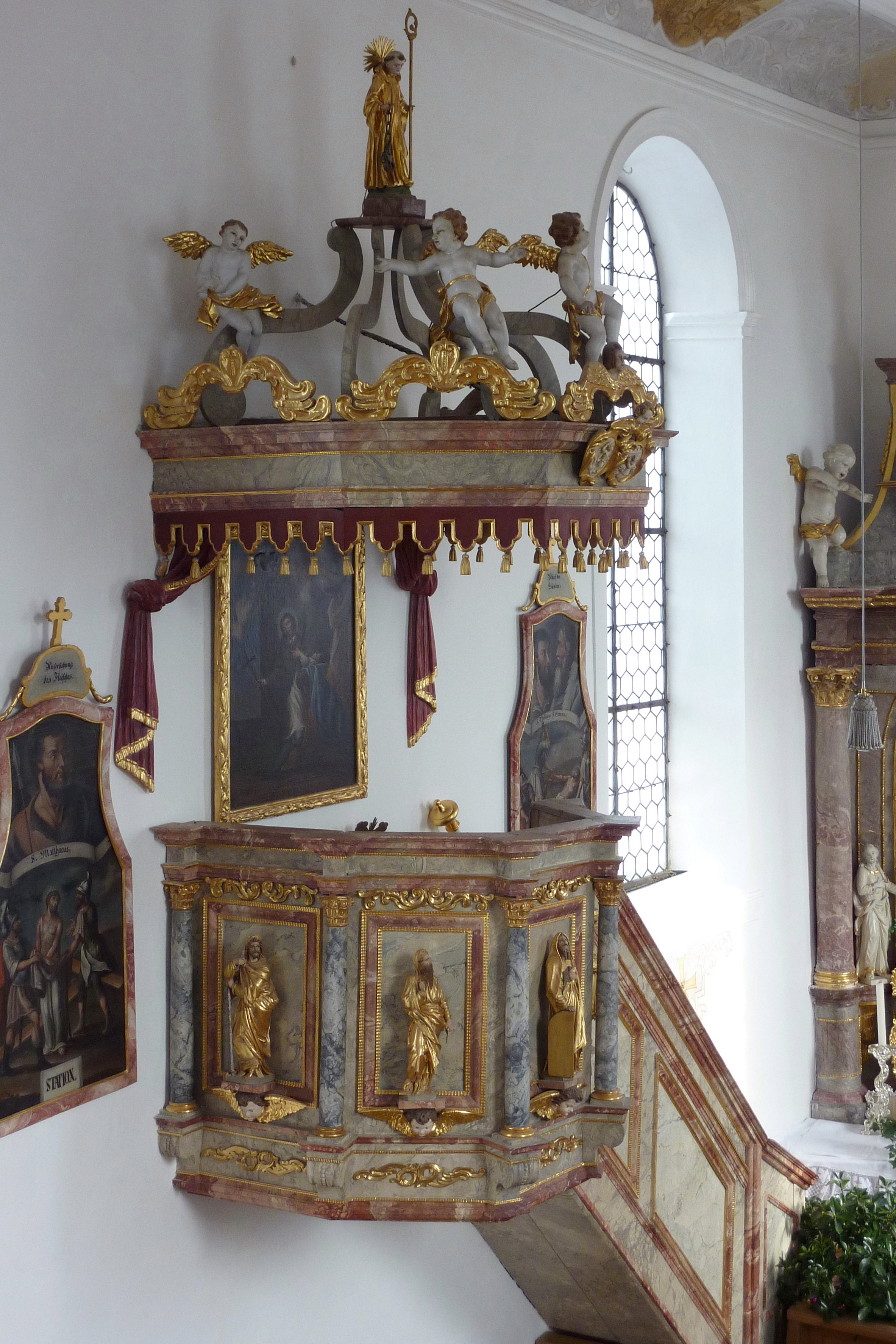 Katholische Pfarrkirche St. Leonhard in Baiershofen, einem Ortsteil der Gemeinde Altenmünster im Landkreis Augsburg (Bayern), Kanzel